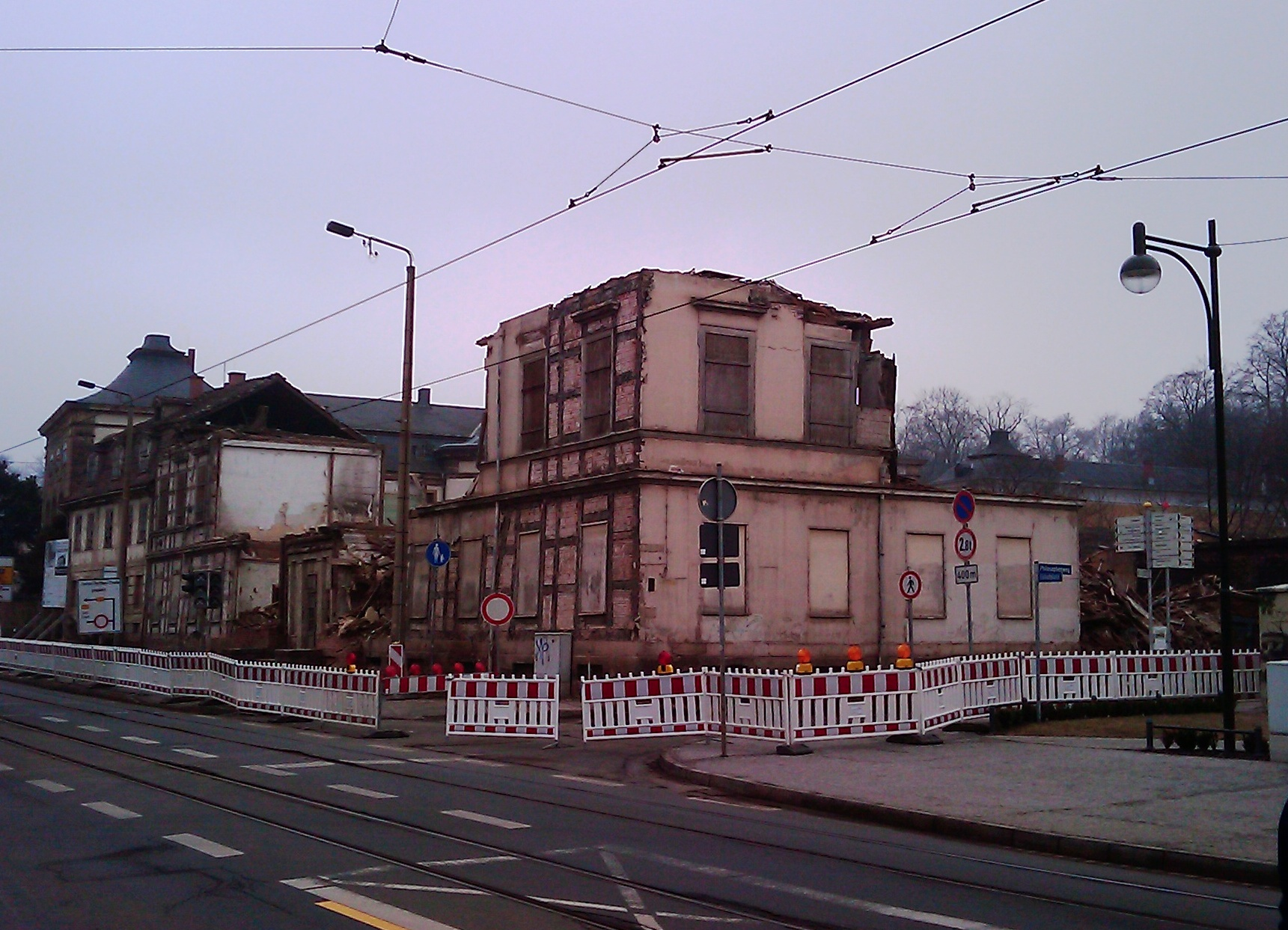 Ruine des Winterpalais Gotha